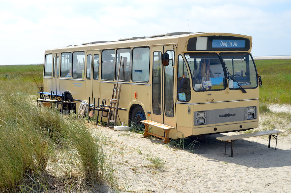 De Utrechtse GVU-bus 44 bij het strand van Schiermonnikoog. Foto: Erik Swierstra